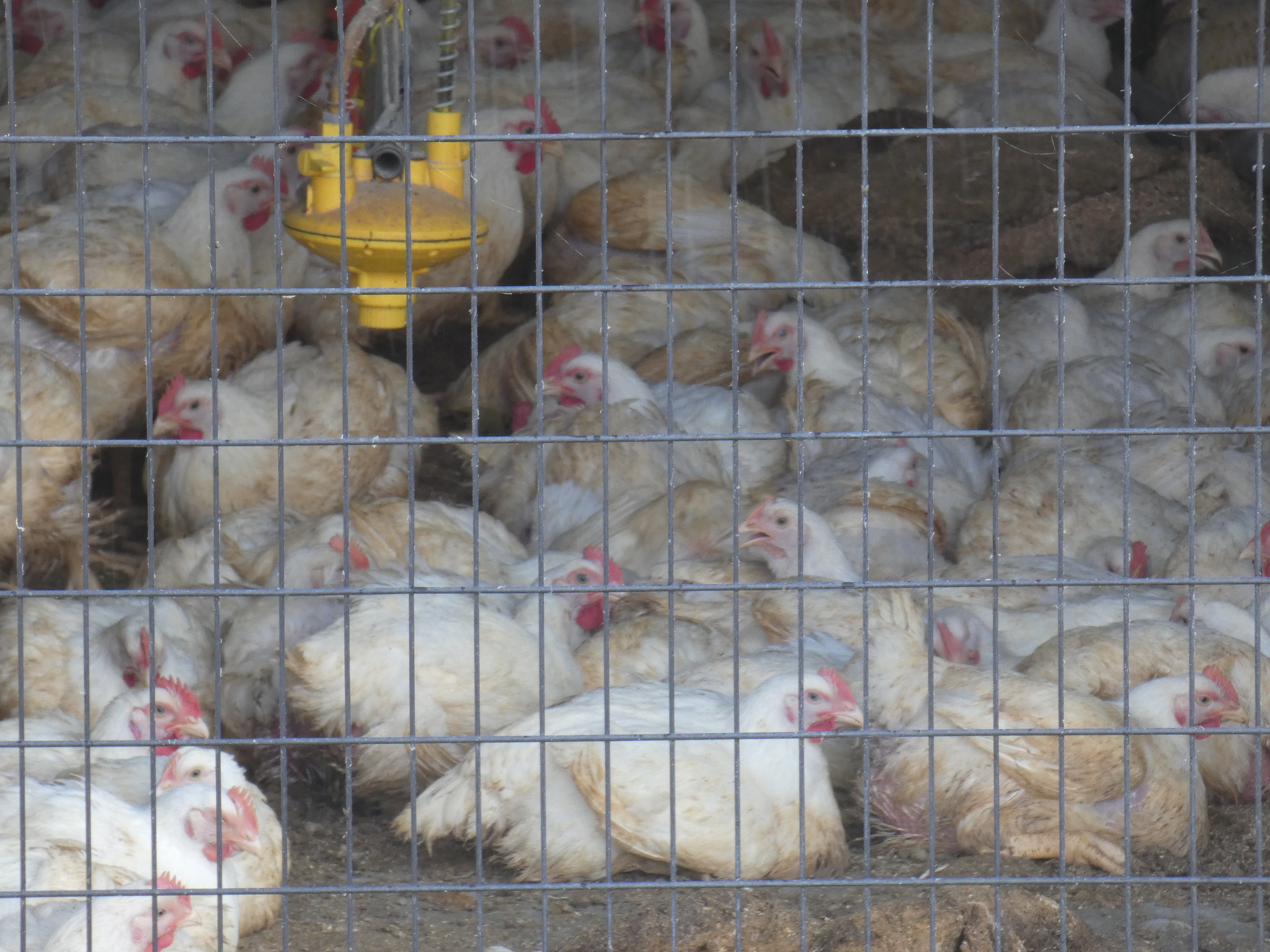 鶏舎の中で飼育され、50日齢ほどで出荷される